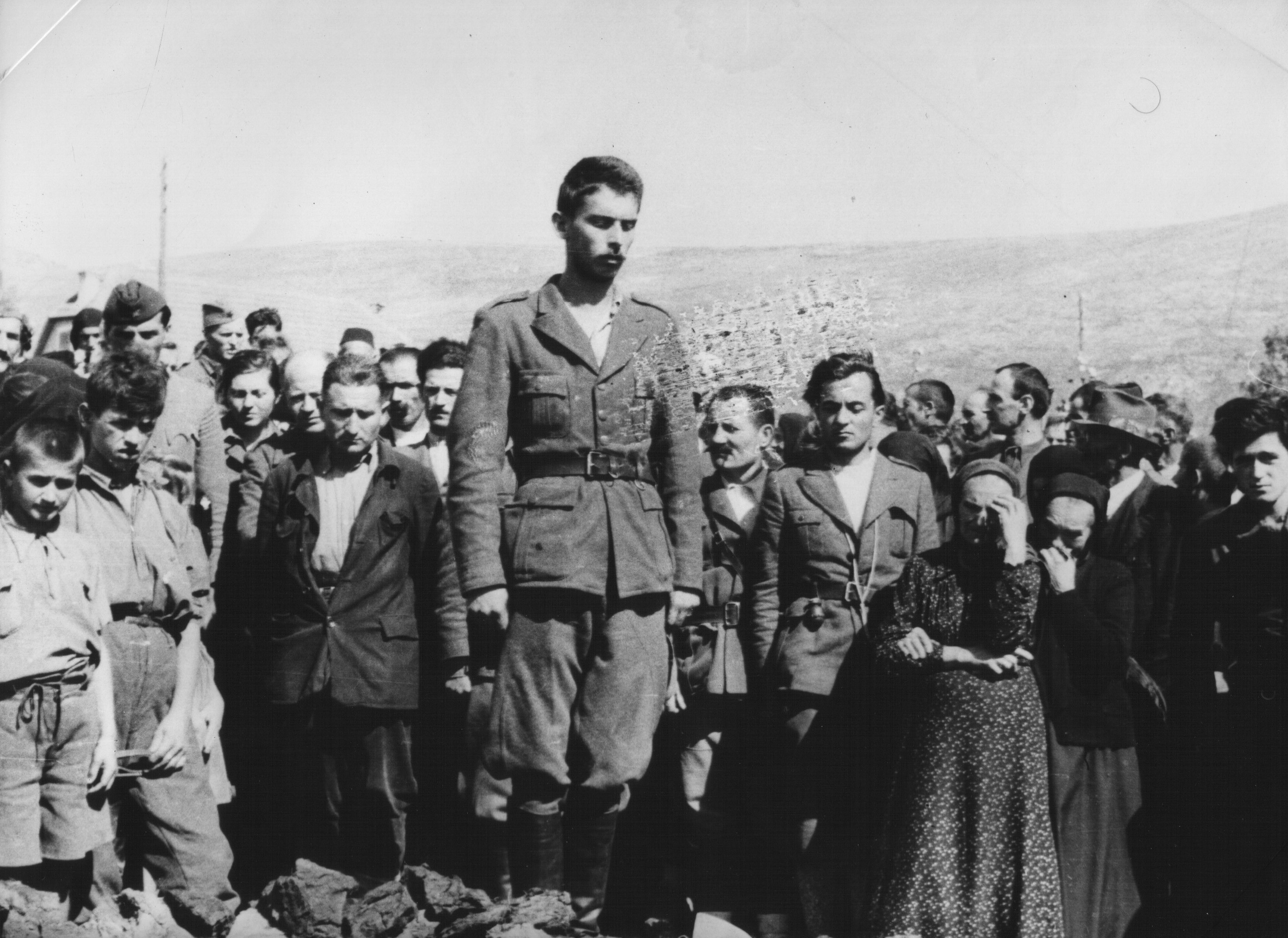 Srpskohrvatski / српскохрватски: Slobodan Penezić Krcun govori na sahrani Boška Buhe u Pljevljima, septembra 1943.